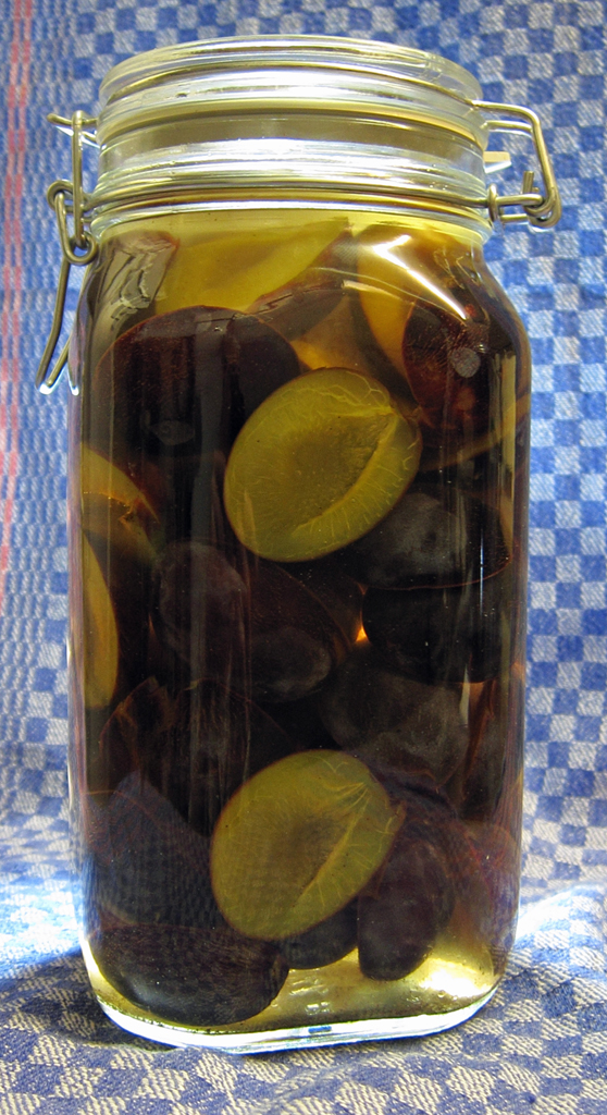 Eingelegte Zwetschgen (eingelegt in eine Mischung aus Rum, Kirschwasser und Zucker), zur Verwendung als Zwetschgen mit Schwips bei der (späteren) Zubereitung von Desserts.